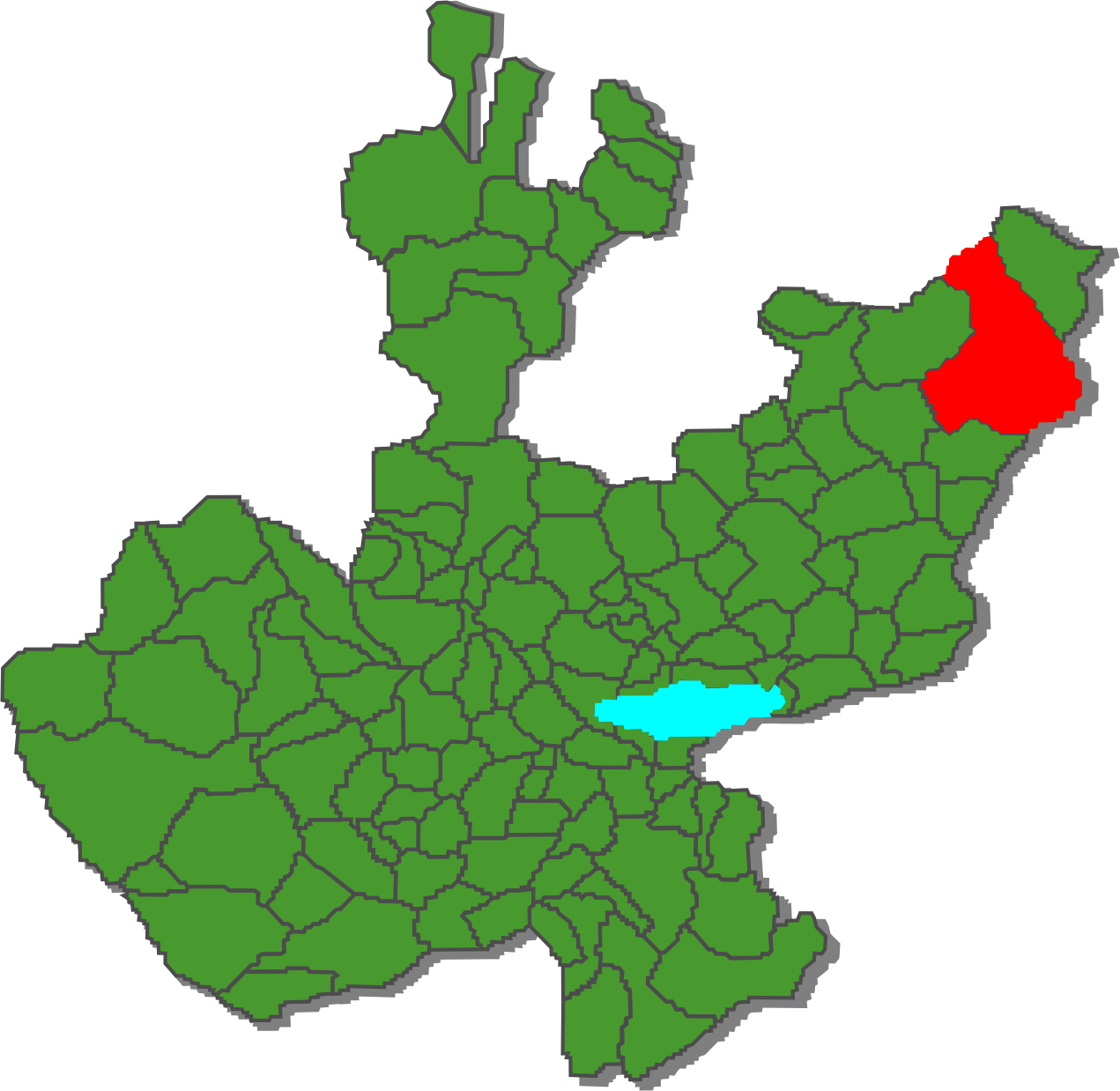 Mapa de ubicación del municipio "Lagos de Moreno" en Jalisco.